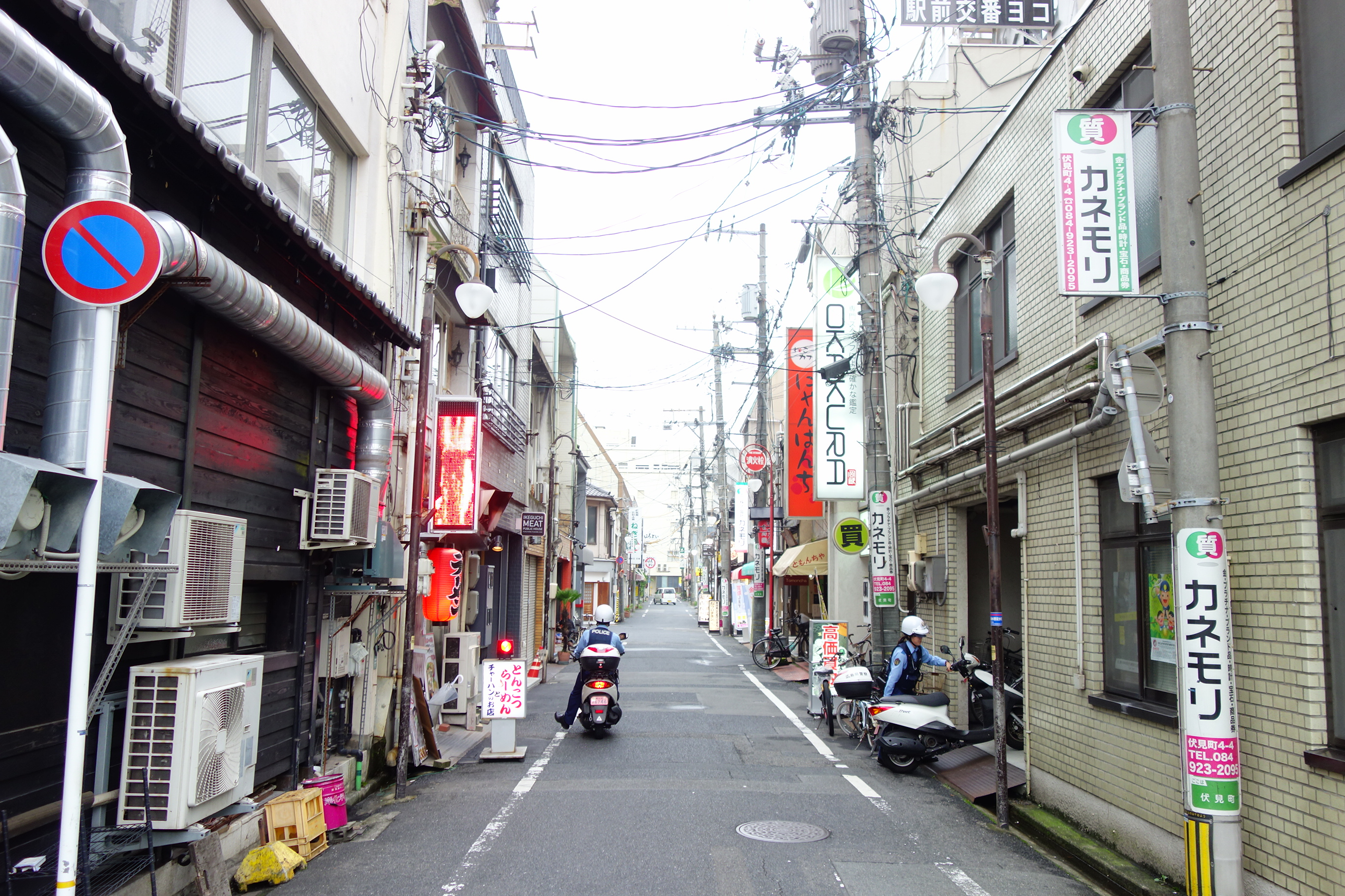 福山市伏見町2019年。再開発計画が頓挫し、街の老朽化が進む。